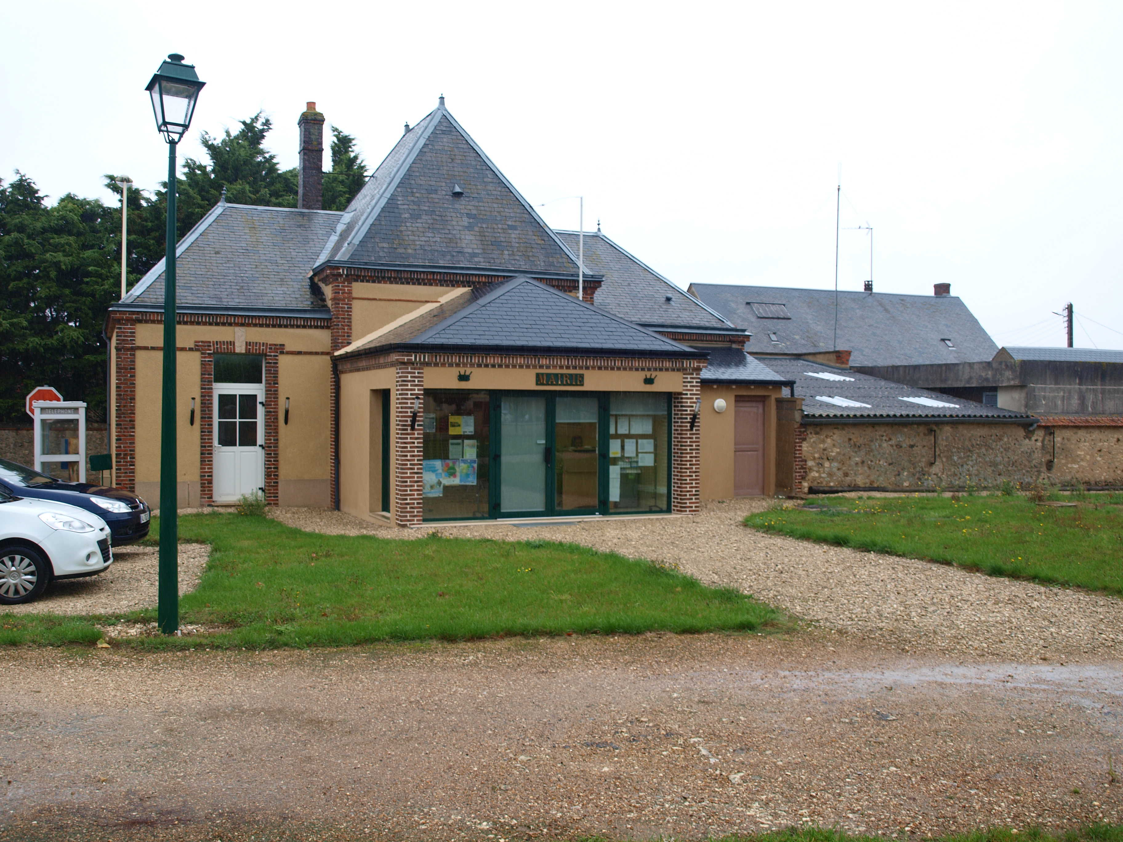 Dancy (Eure-et-Loir, France) : la mairie.